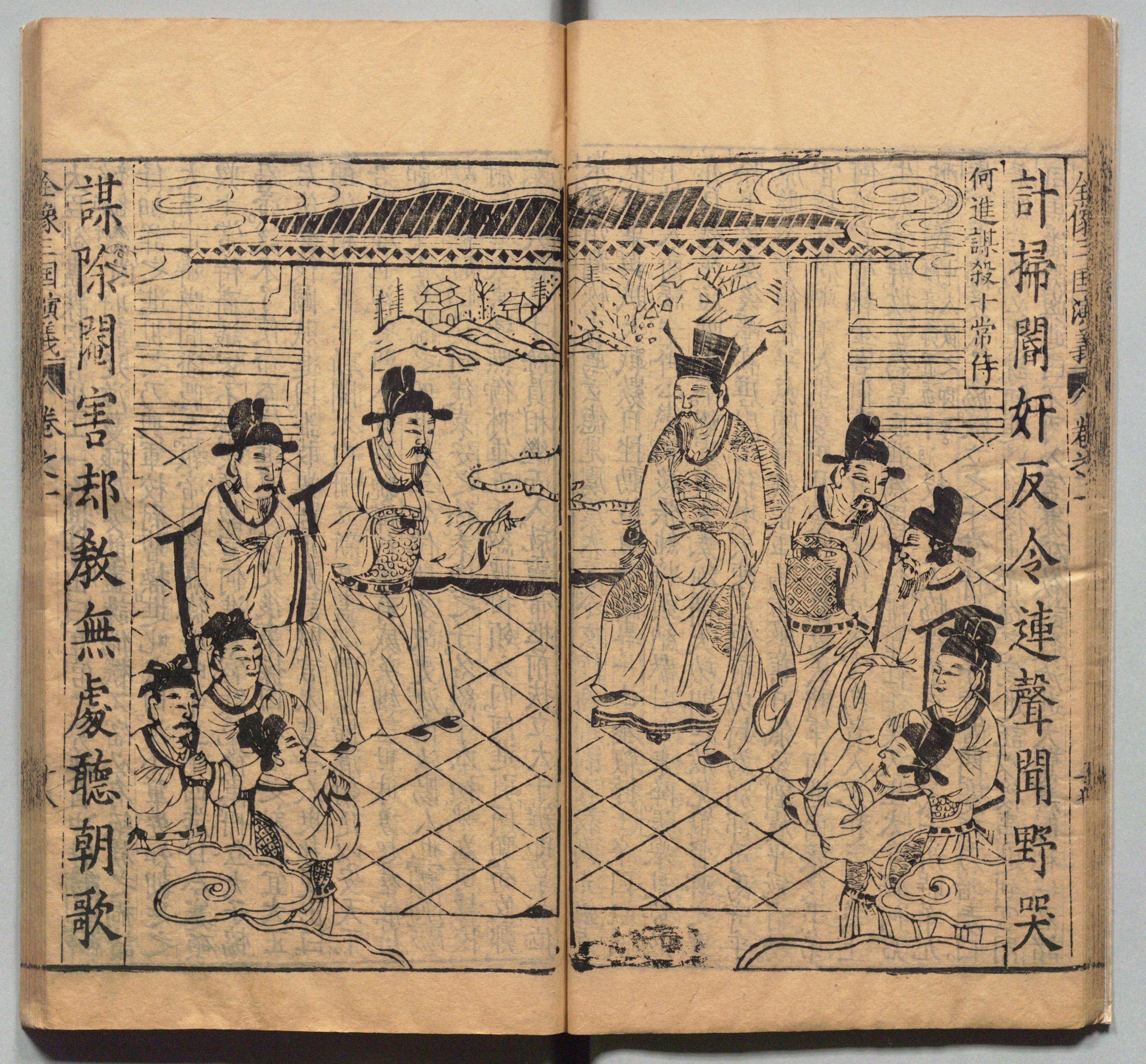 《新刊校正古本大字音释三国志通俗演义》 明万历十九年书林周曰校刊本